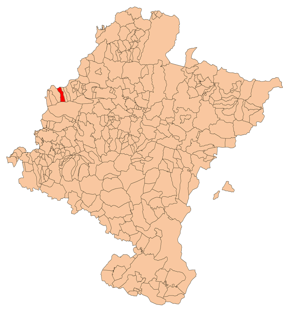 Urdiain Nafarroako mapan kokatua.